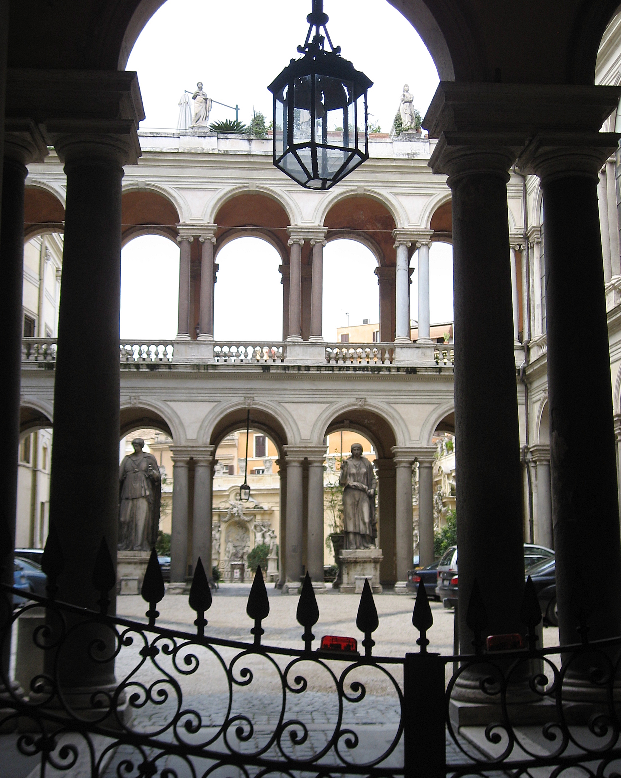 Blick in den Innenhof des Palazzo Borghese in Rom/Italien